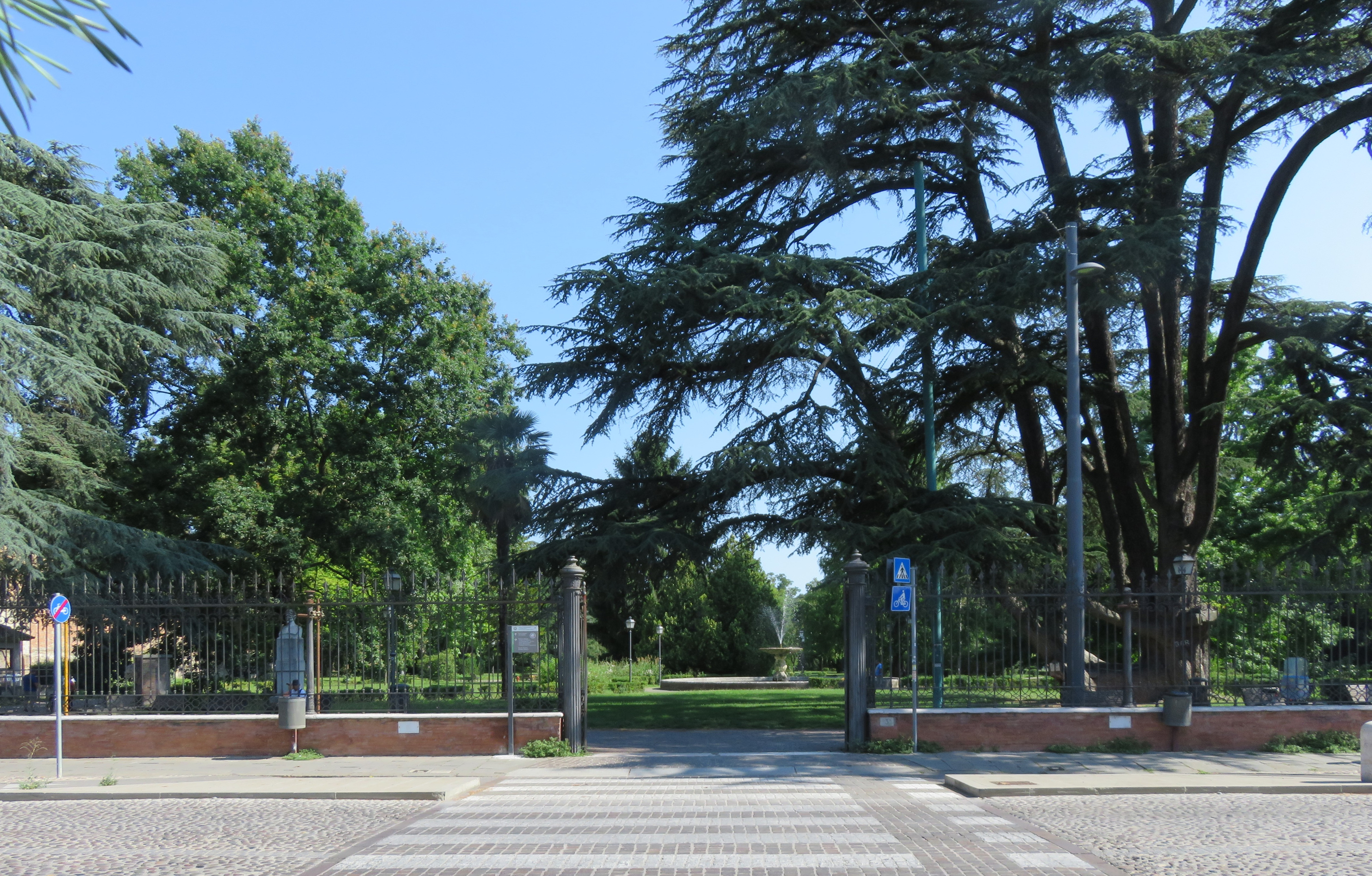 Parco Massari, entrata su Corso Porta Mare